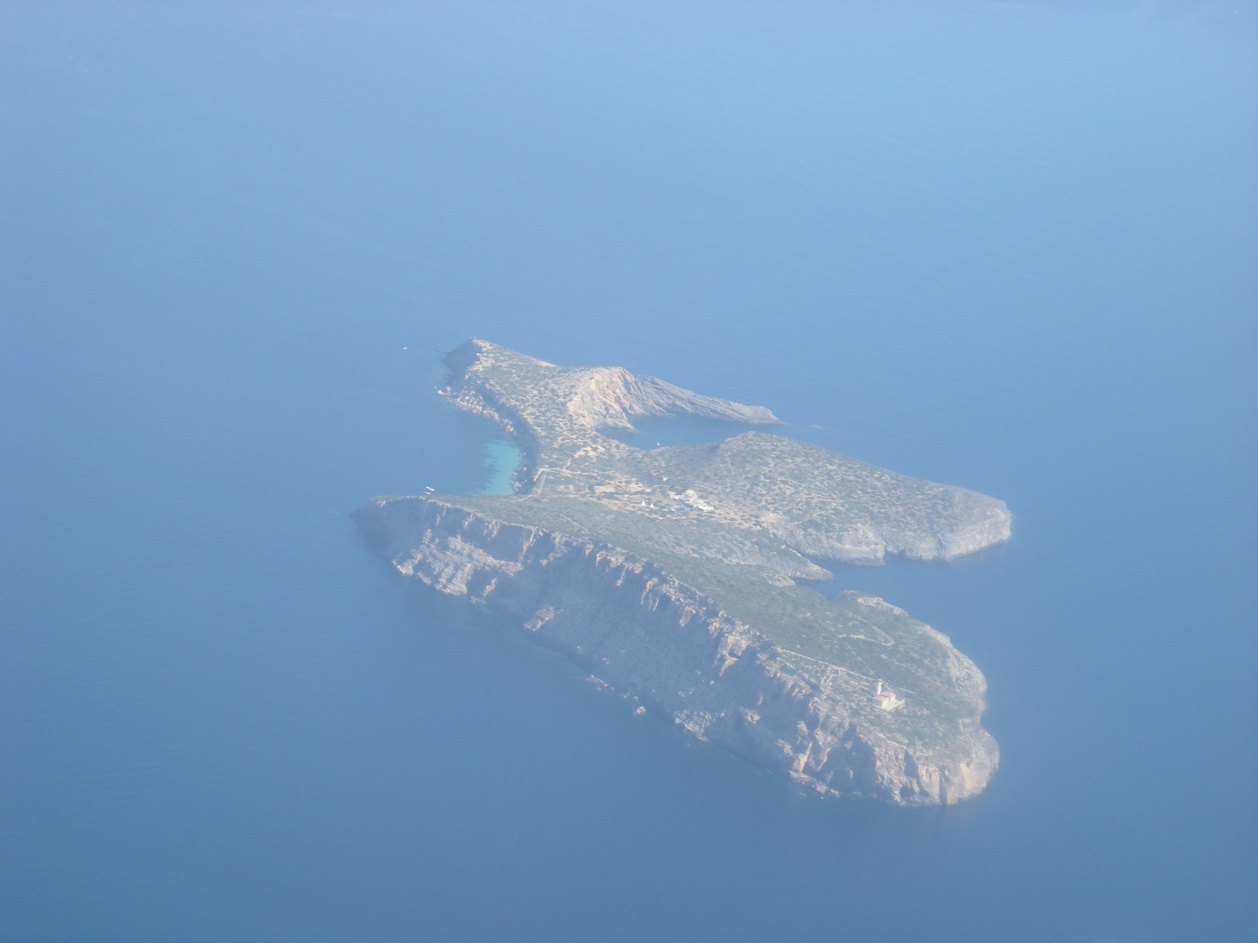 Foto aèria de Tagomago, Eivissa.